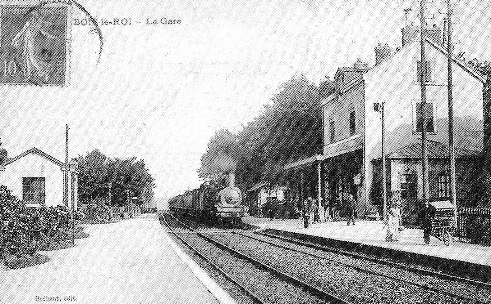 Gare de Bois-le-Roi (Seine-et-Marne, France), au début du XX° siècle.